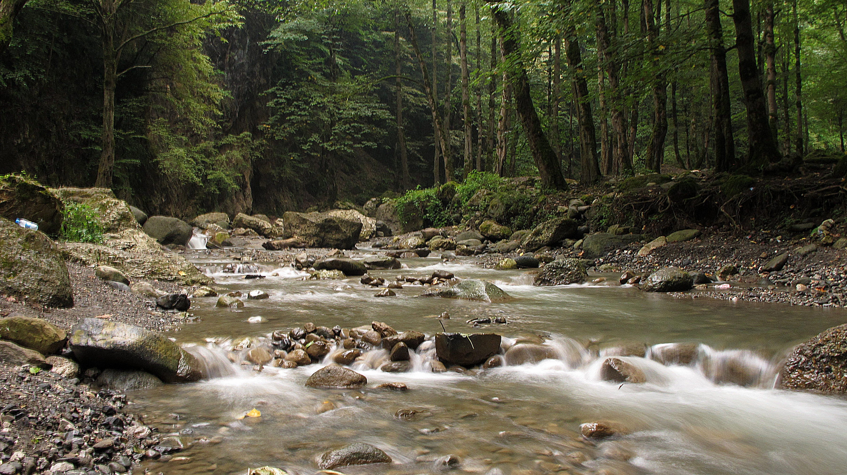 Taken in Safarood, Ramsar